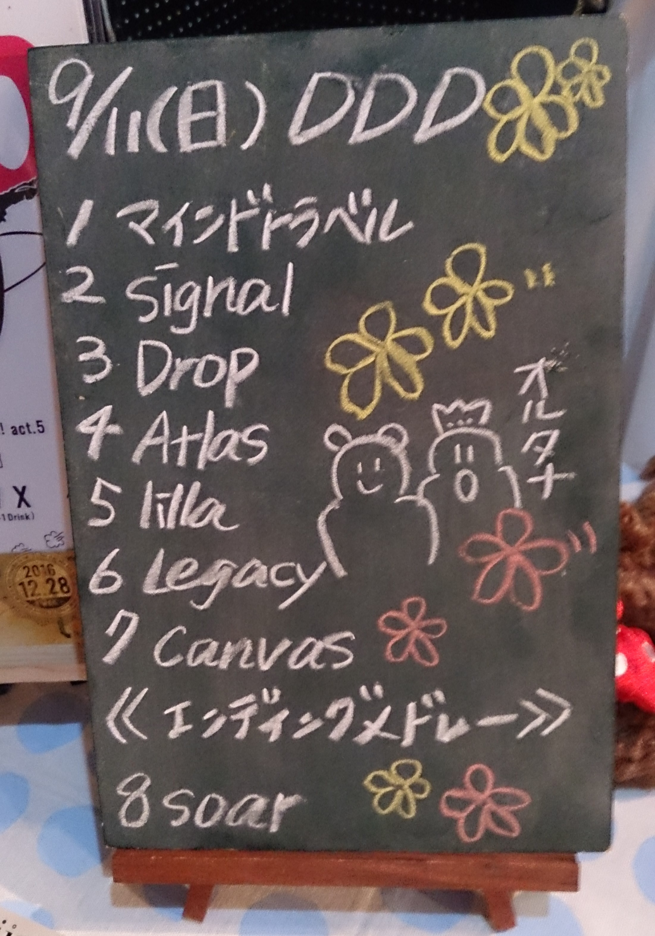 amiinAセトリボード(20160911(2))